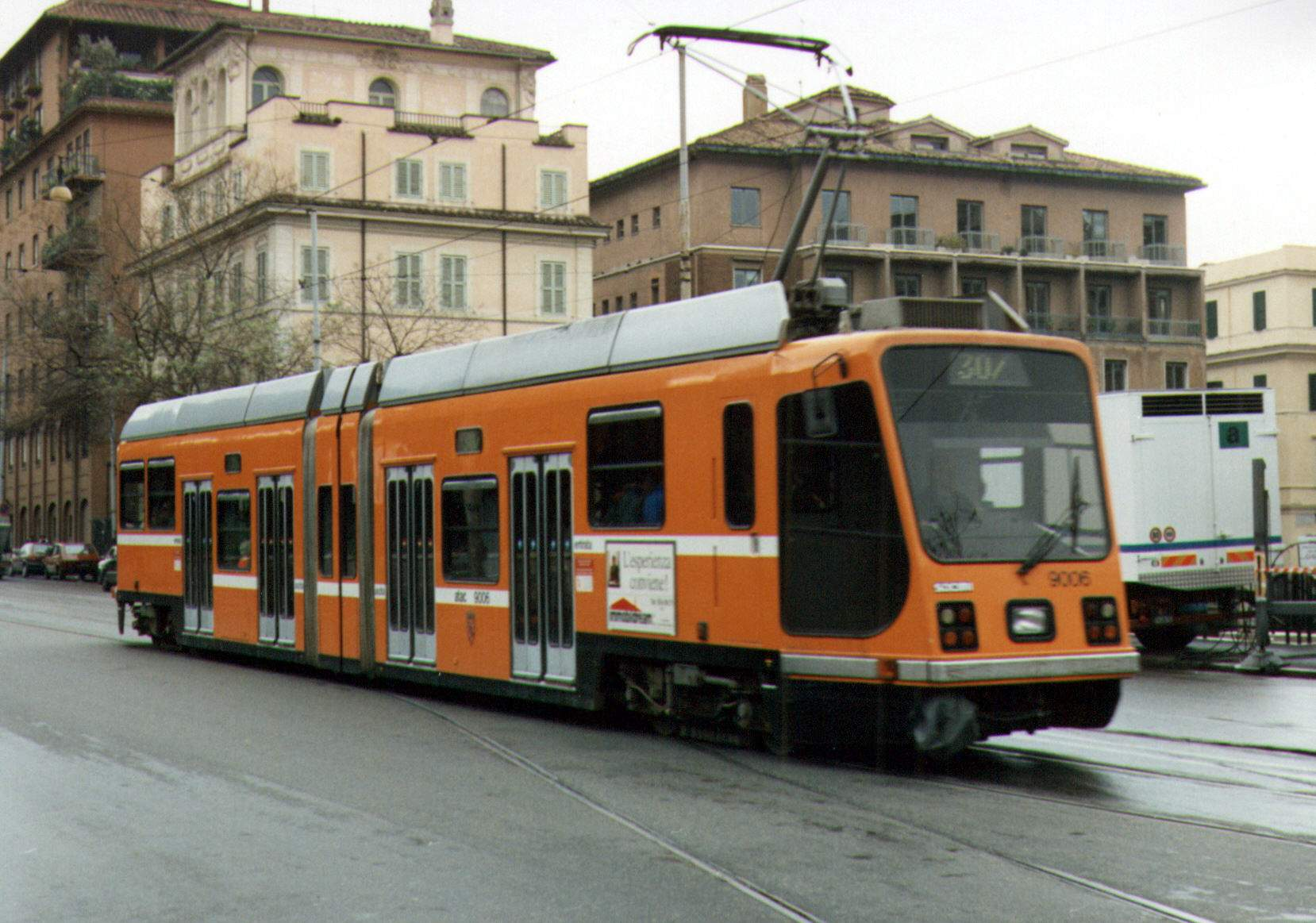 Vettura tranviaria 9006 dell'ATAC di Roma